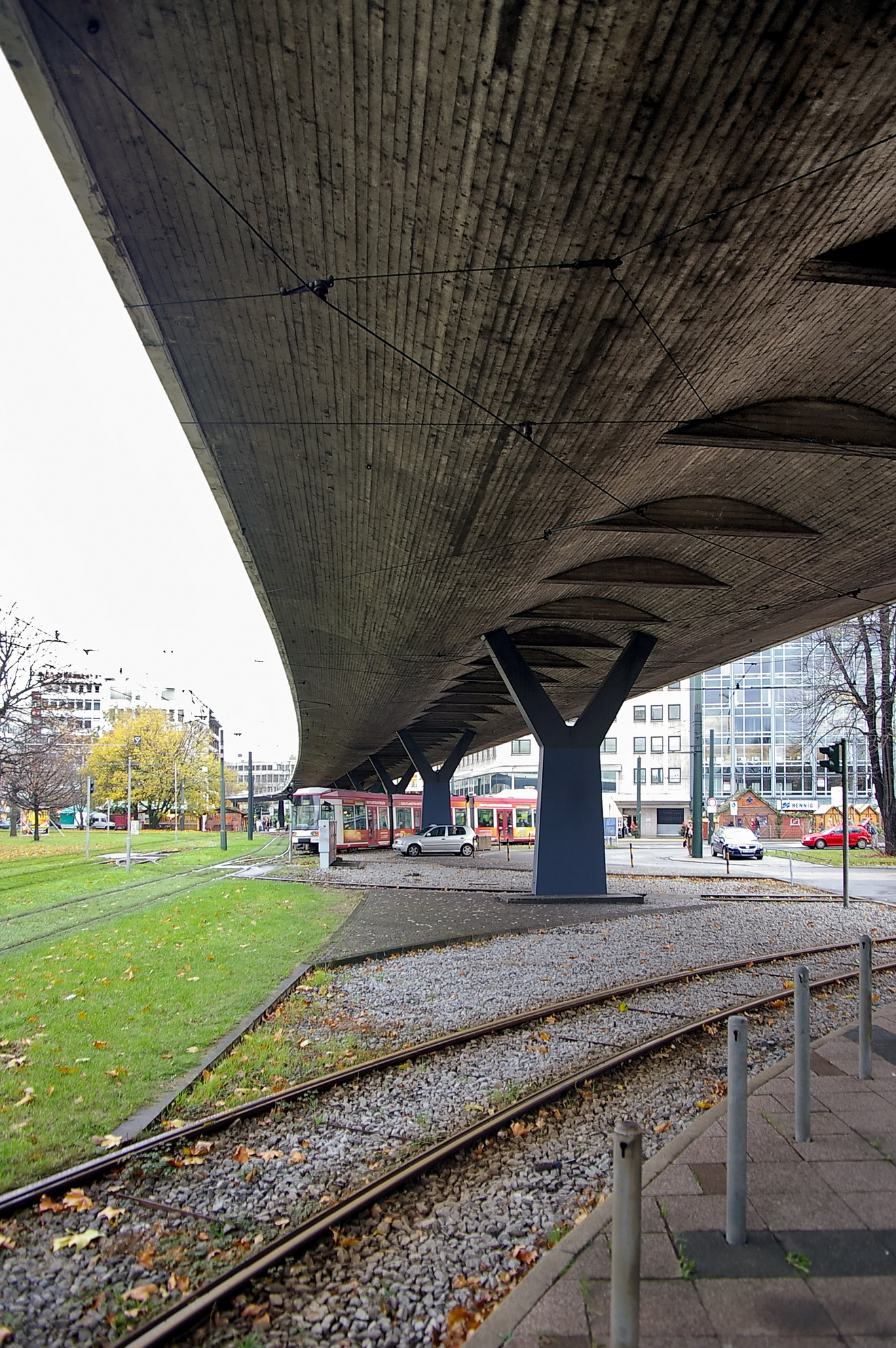 Tausendfüßler in der Düsseldorfer Innenstadt, Auffahrrampe aus Richtung Norden, Blickrichtung Süden.